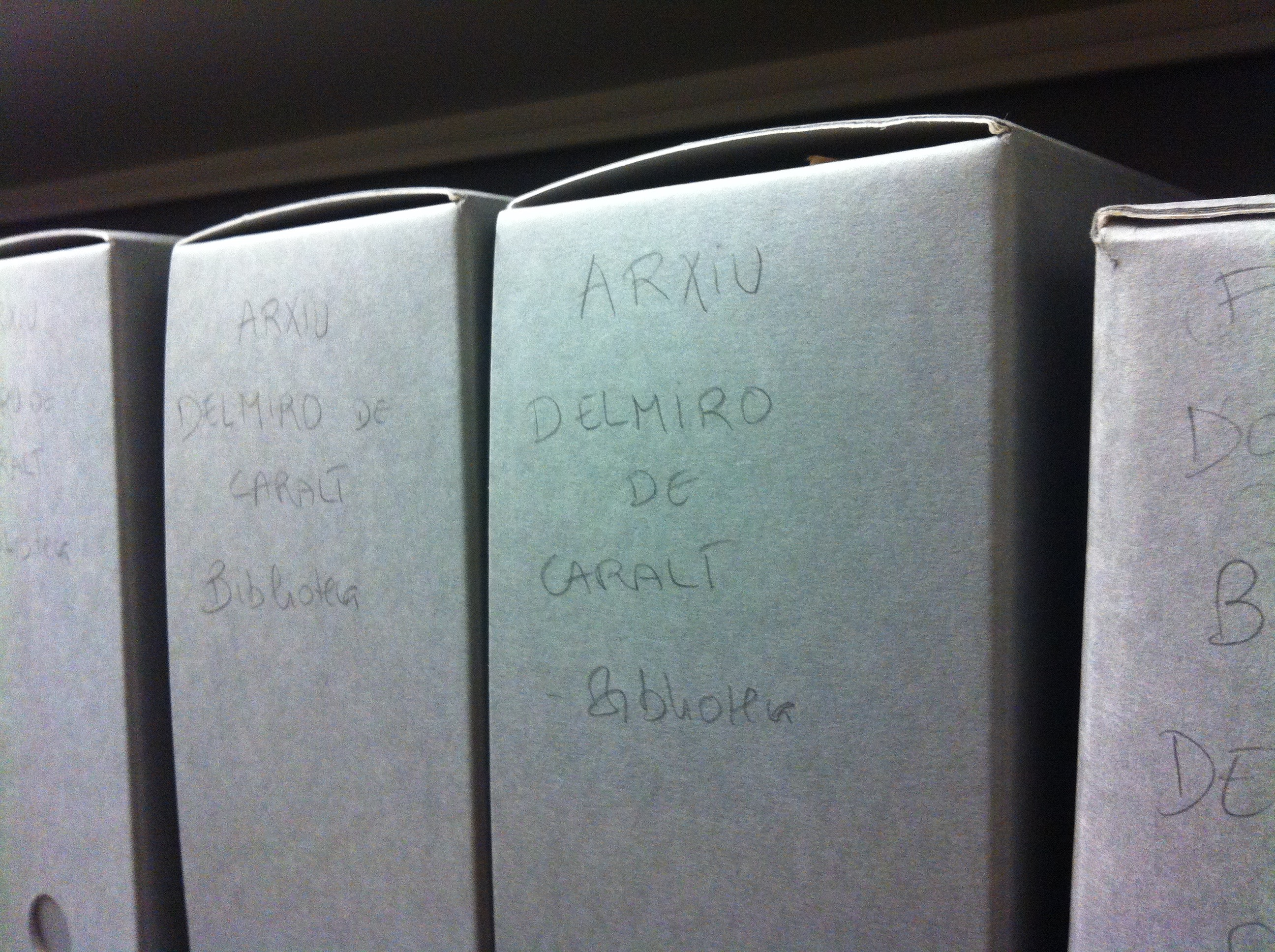 Fons Delmiro de Caralt